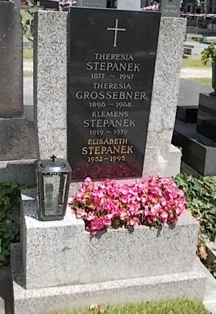 Elisabeth Stepanek-Hernalser Friedhof (R-90)